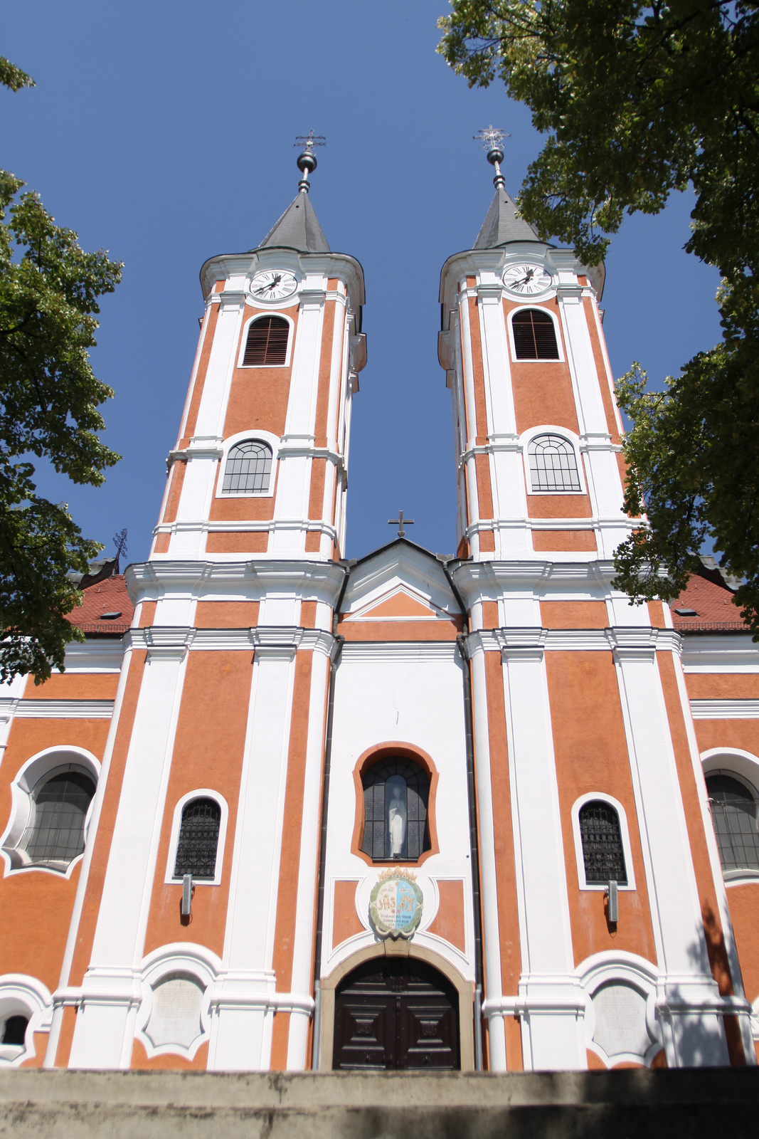 Ferences kegytemplom (Siklós, MÁRIAGYŰD) This is a photo of a monument in Hungary. Identifier: 1921